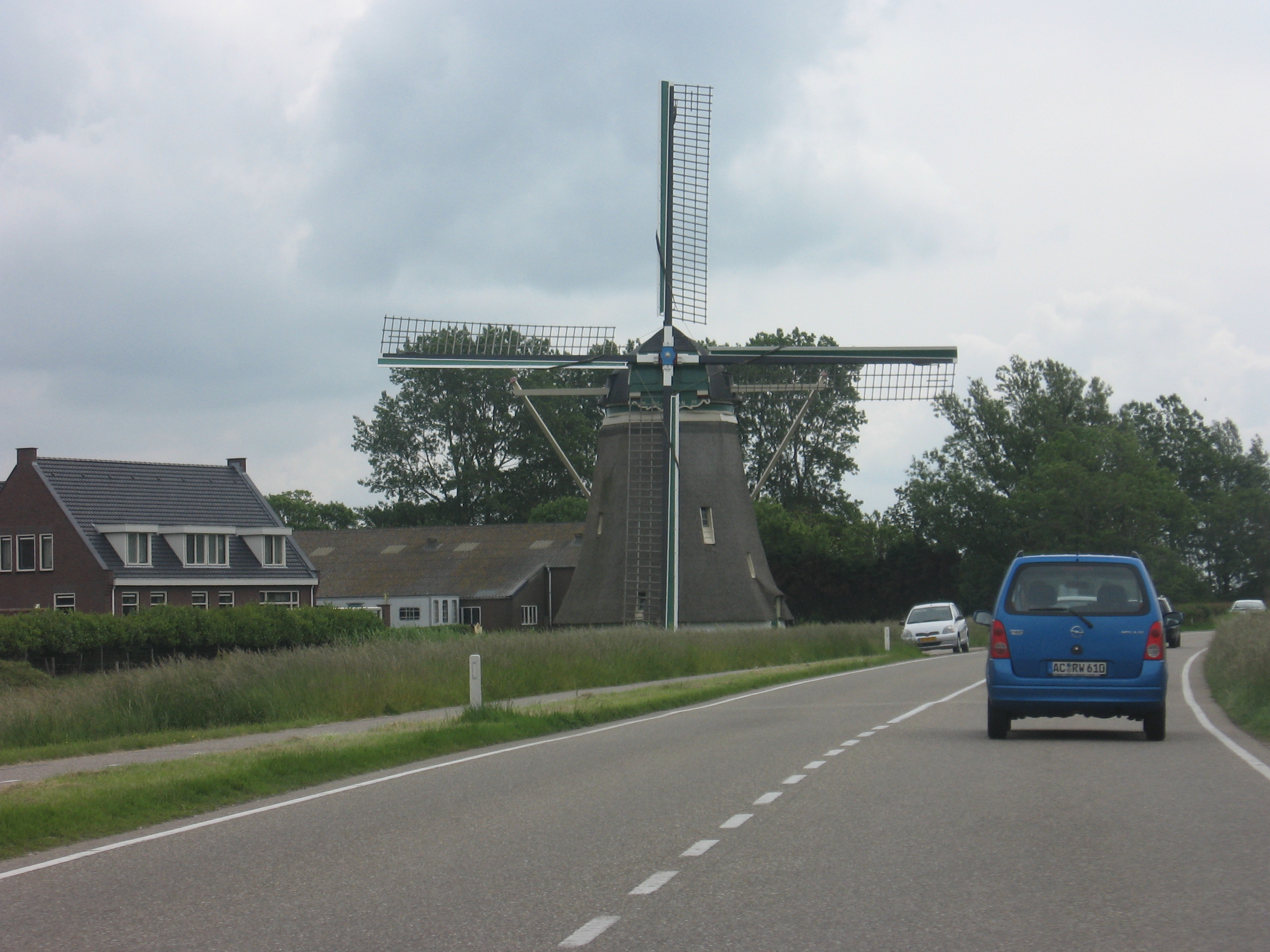 Windmill, Moriaanshoofd